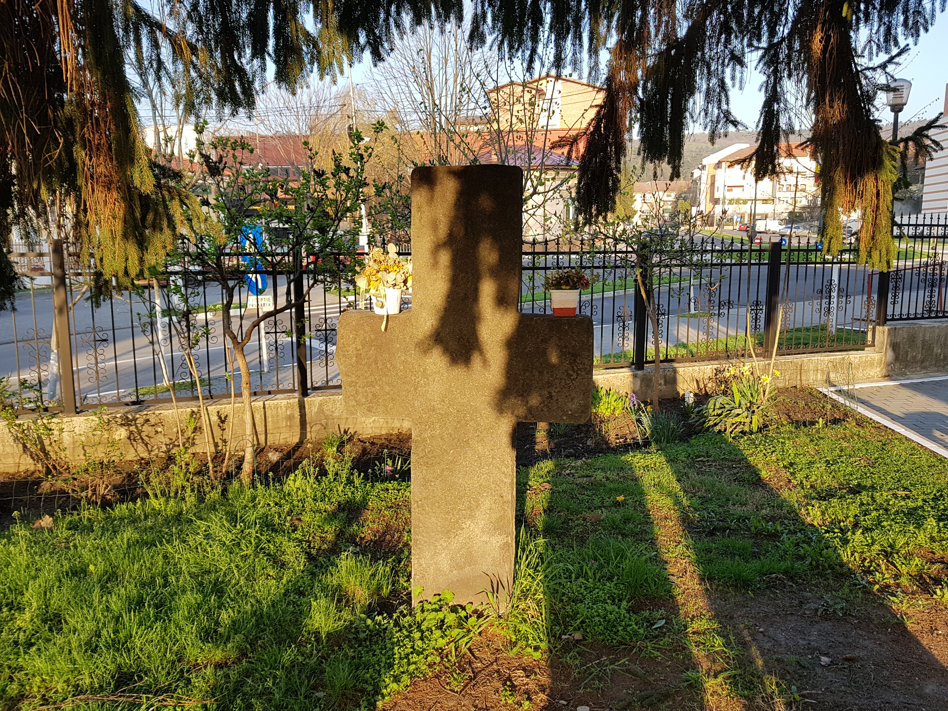 Cruce de piatră